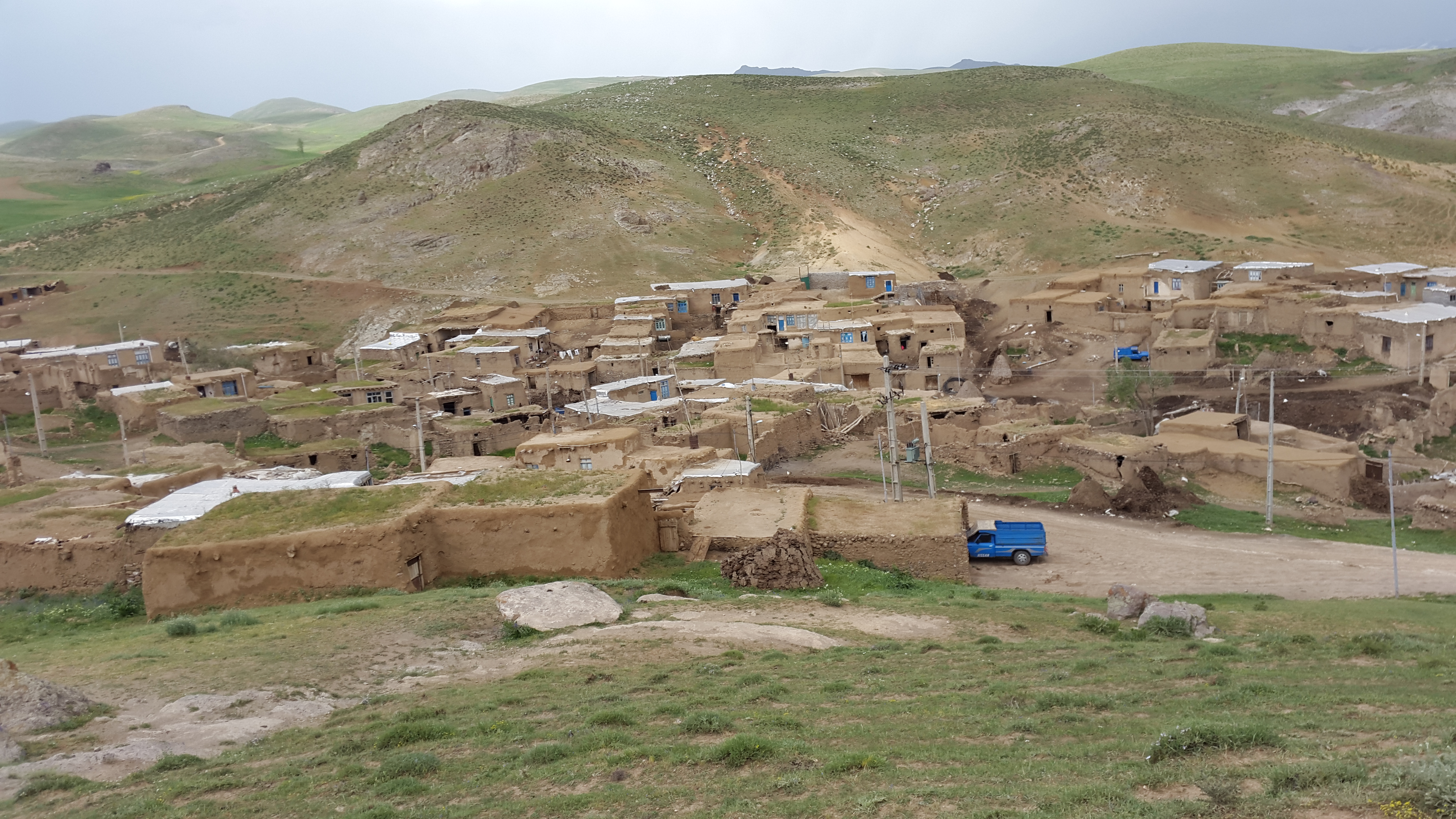 تصویر محلی از روی تپه